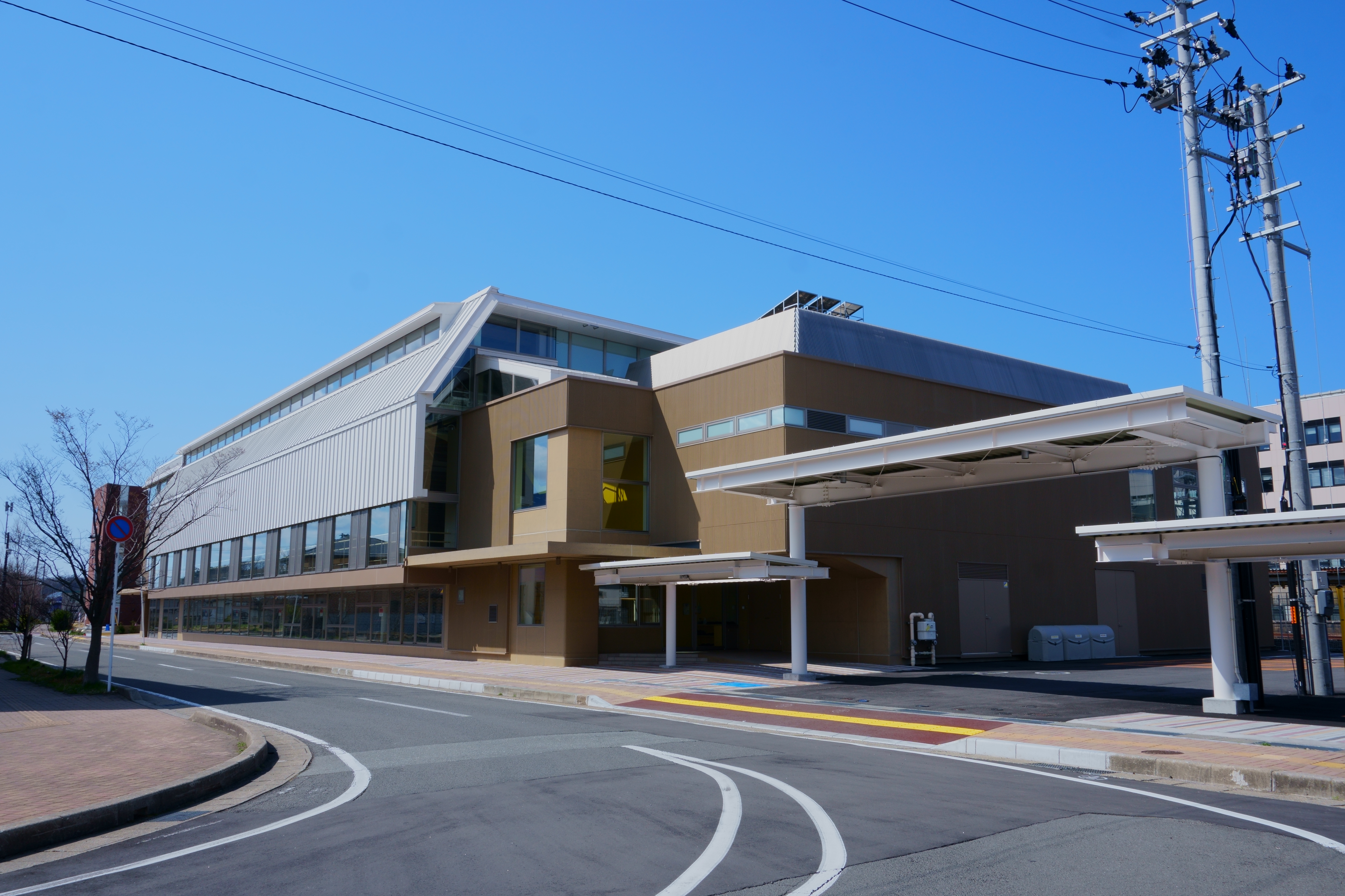 秋田ノーザンゲートスクエア。秋田駅東口にJR東日本秋田支社が開設したアリーナで、同支社の実業団バスケットボールチーム・JR東日本秋田ペッカーズの練習拠点のほか、Bリーグ・秋田ノーザンハピネッツの拠点としても使用される。